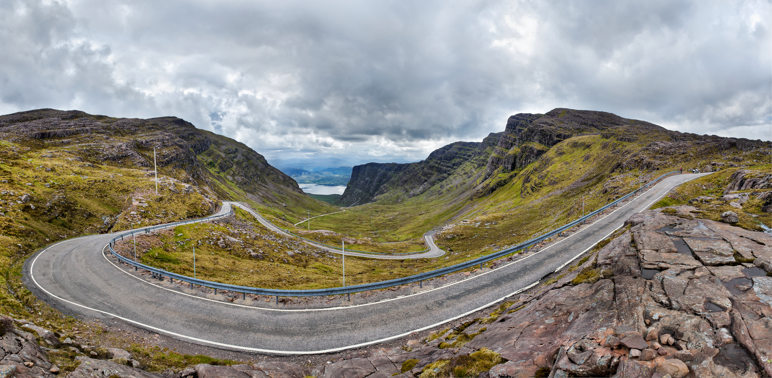 Die Bealach na Bà (gälisch für "Vieh-Pass") ist eine Passstraße in Schottland die von Kishorn nach Applecross führt und auf 626m ansteigt.